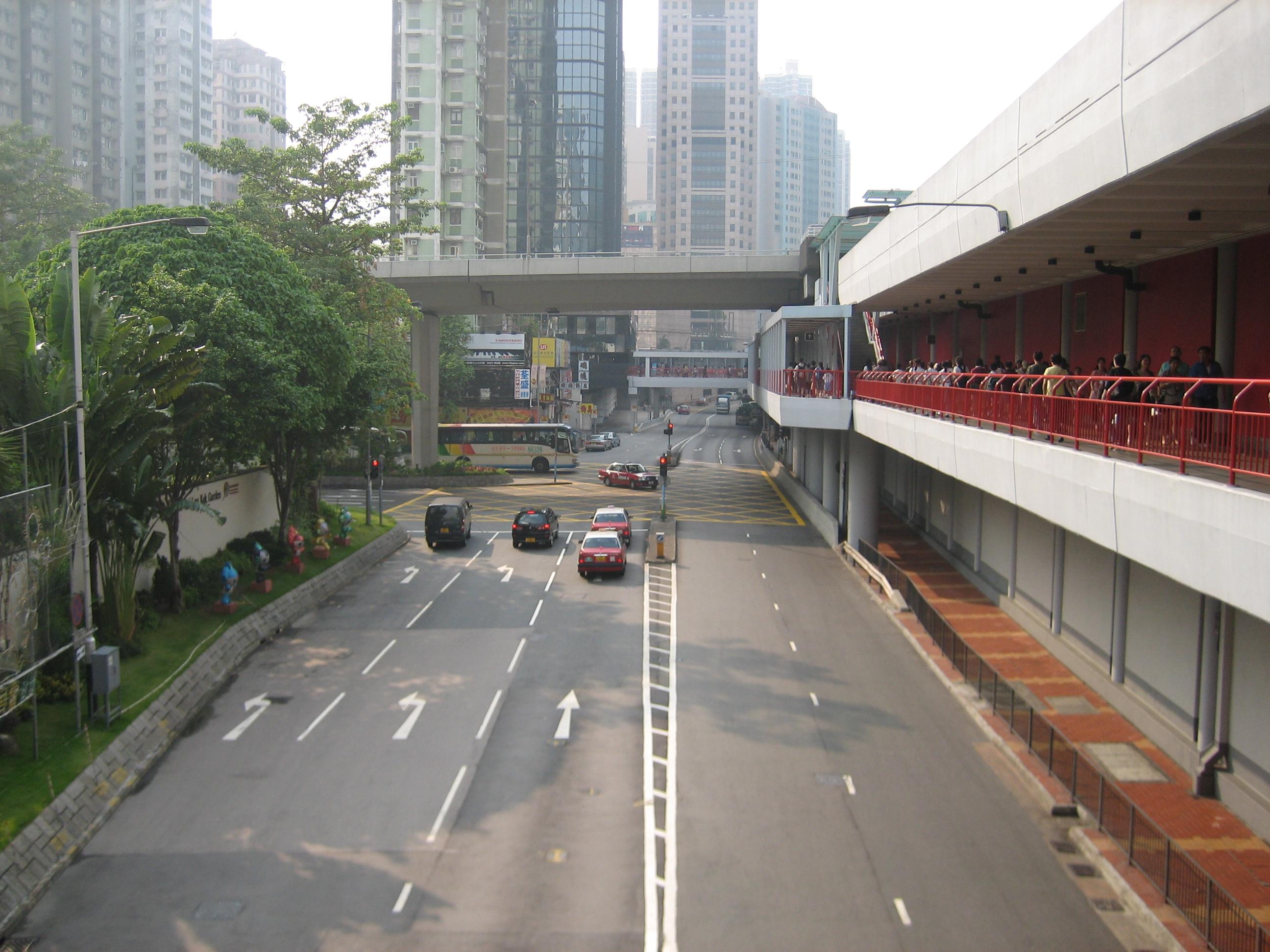 西楼角路